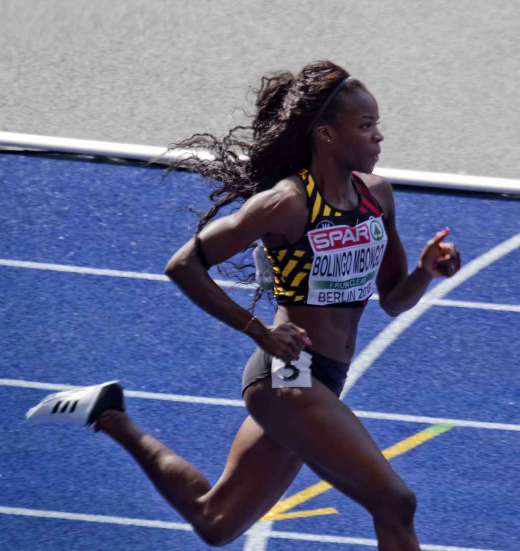 EKB21092 bolingo